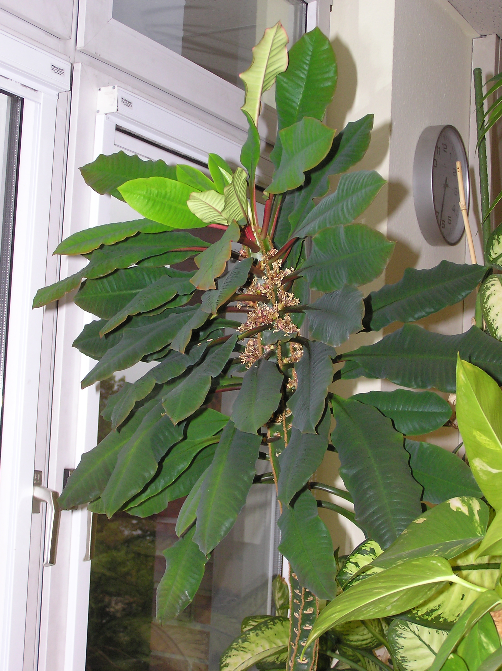 Unbekanntes zur bestimmung